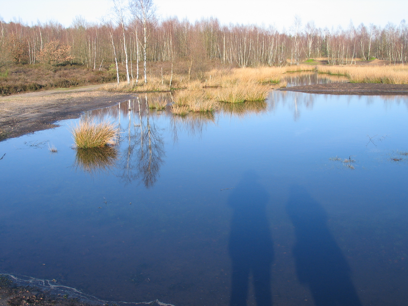 Nationaal Park Hoge Kempen, Belgium - my own work Paul Hermans